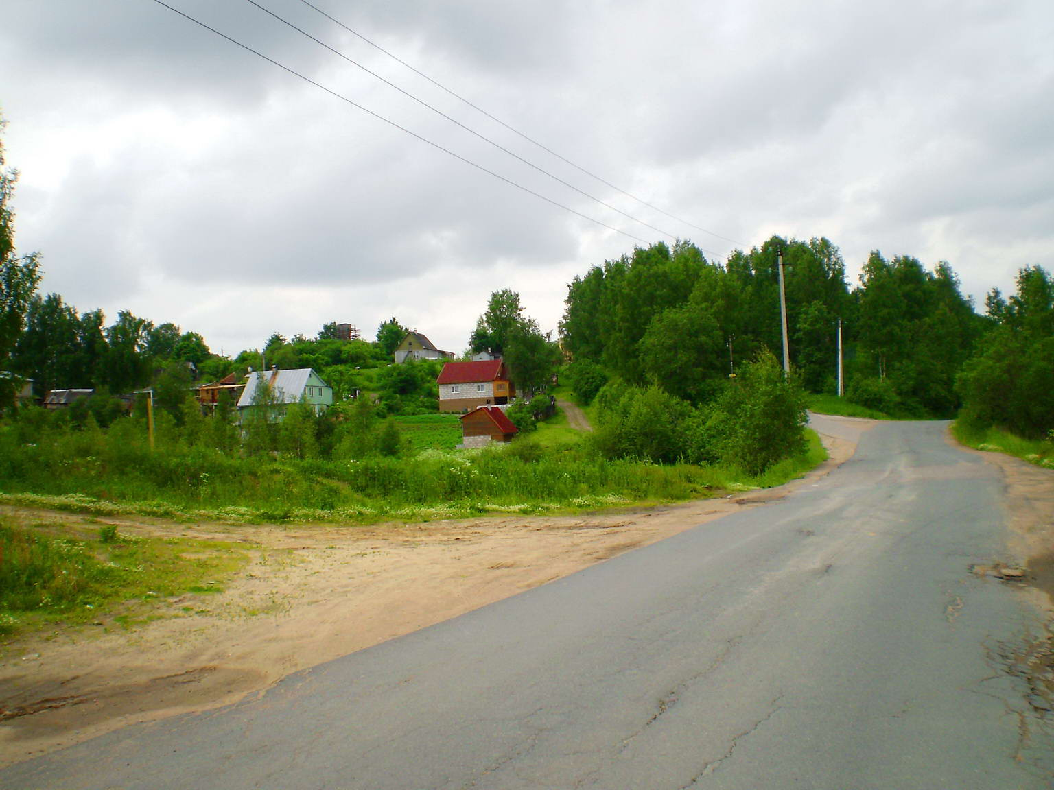 Деревня Орово